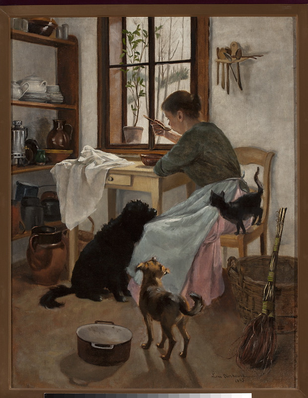 obraz; autorka: Leonia Bierkowska (1855-1910); tytuł: "W izbie"; rok powstania: 1895; technika: olej na płótnie; wymiary: 64 x 50 [92,5 x 78 x 5] cm; właściciel: Muzeum Narodowe w Warszawie; nr inwentarza: MP 1286 MNW; styl: Młoda Polska